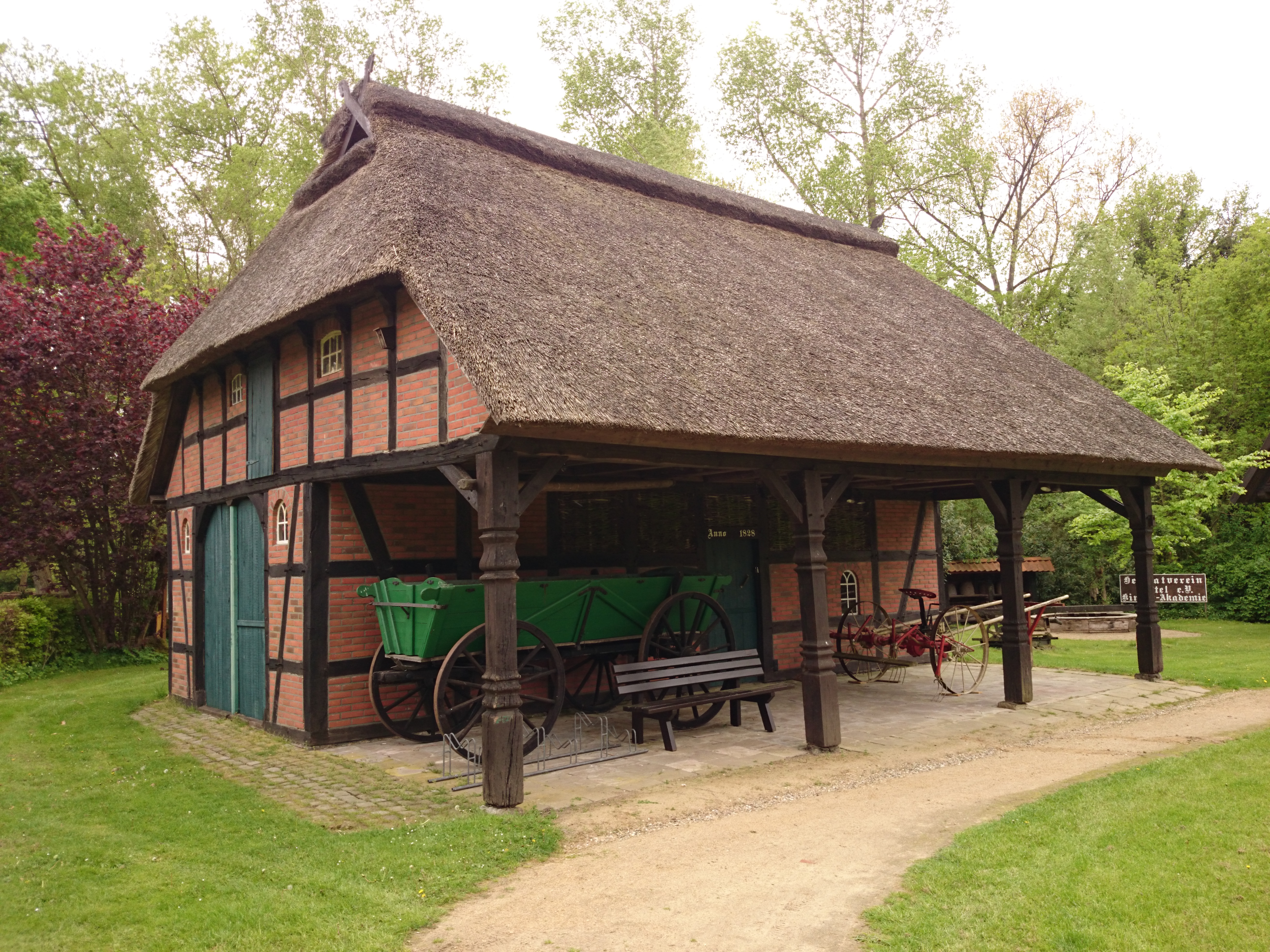 Die Remise auf dem Gelände des Heimatvereins, Pferdemarkt 12.